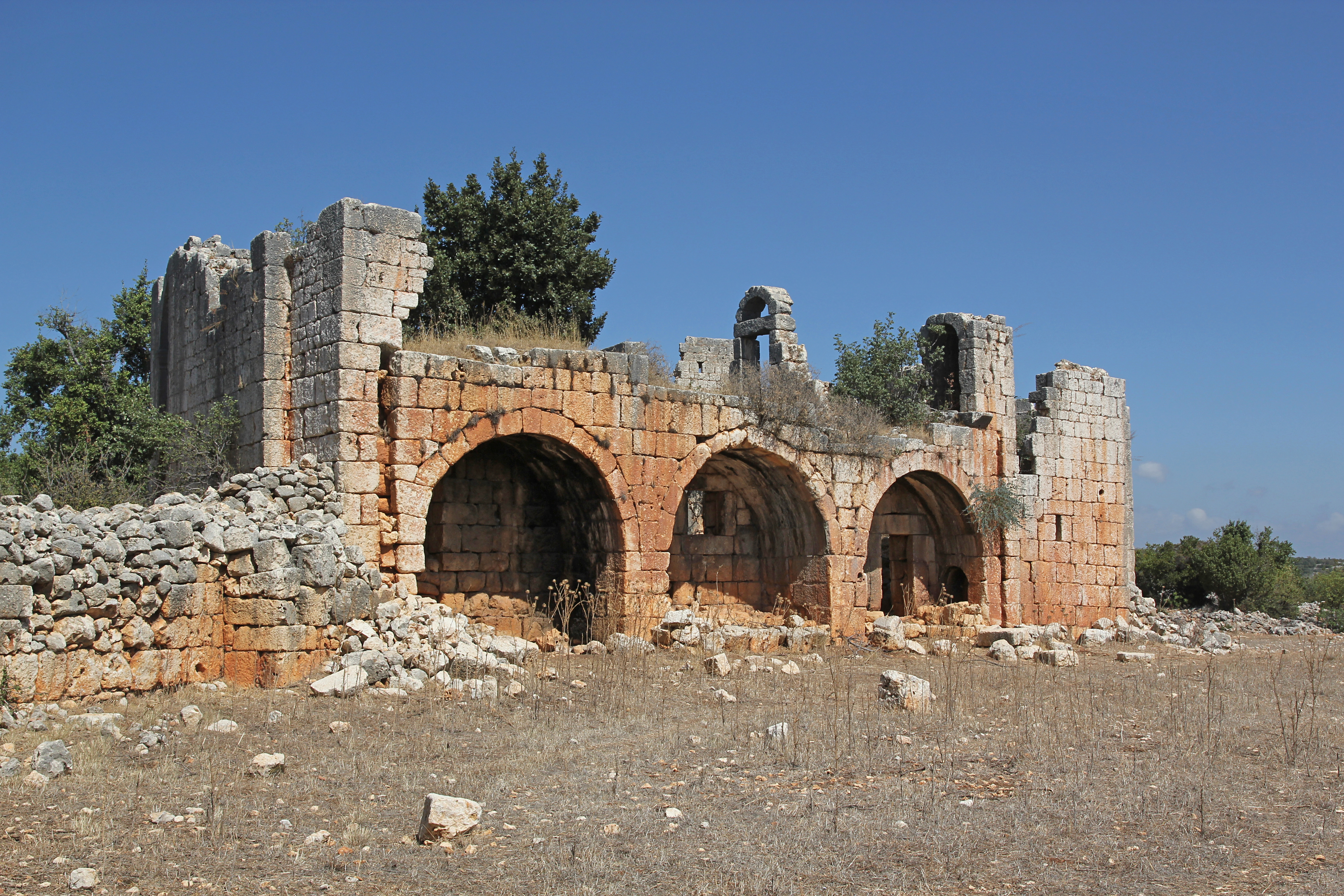 Villa Rustica bei Kızkalesi in der Südtürkei, Südwestseite